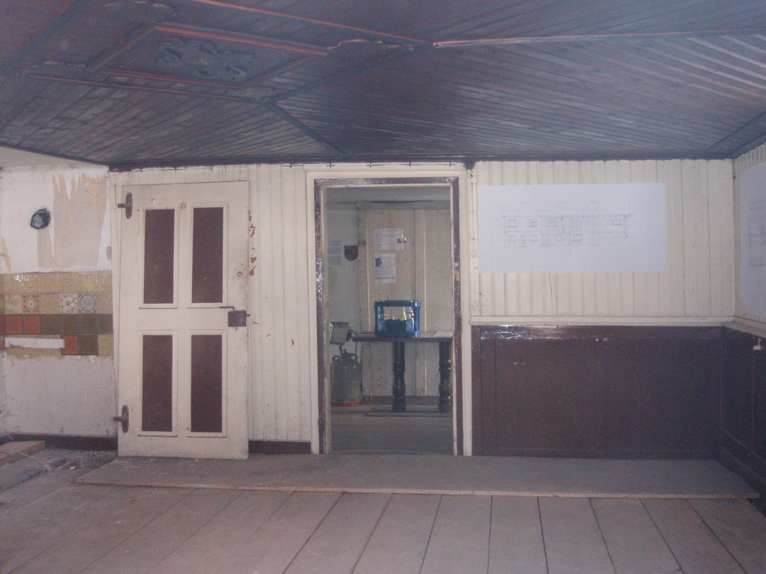 Blick ins Innere des Möggenried-Hauses